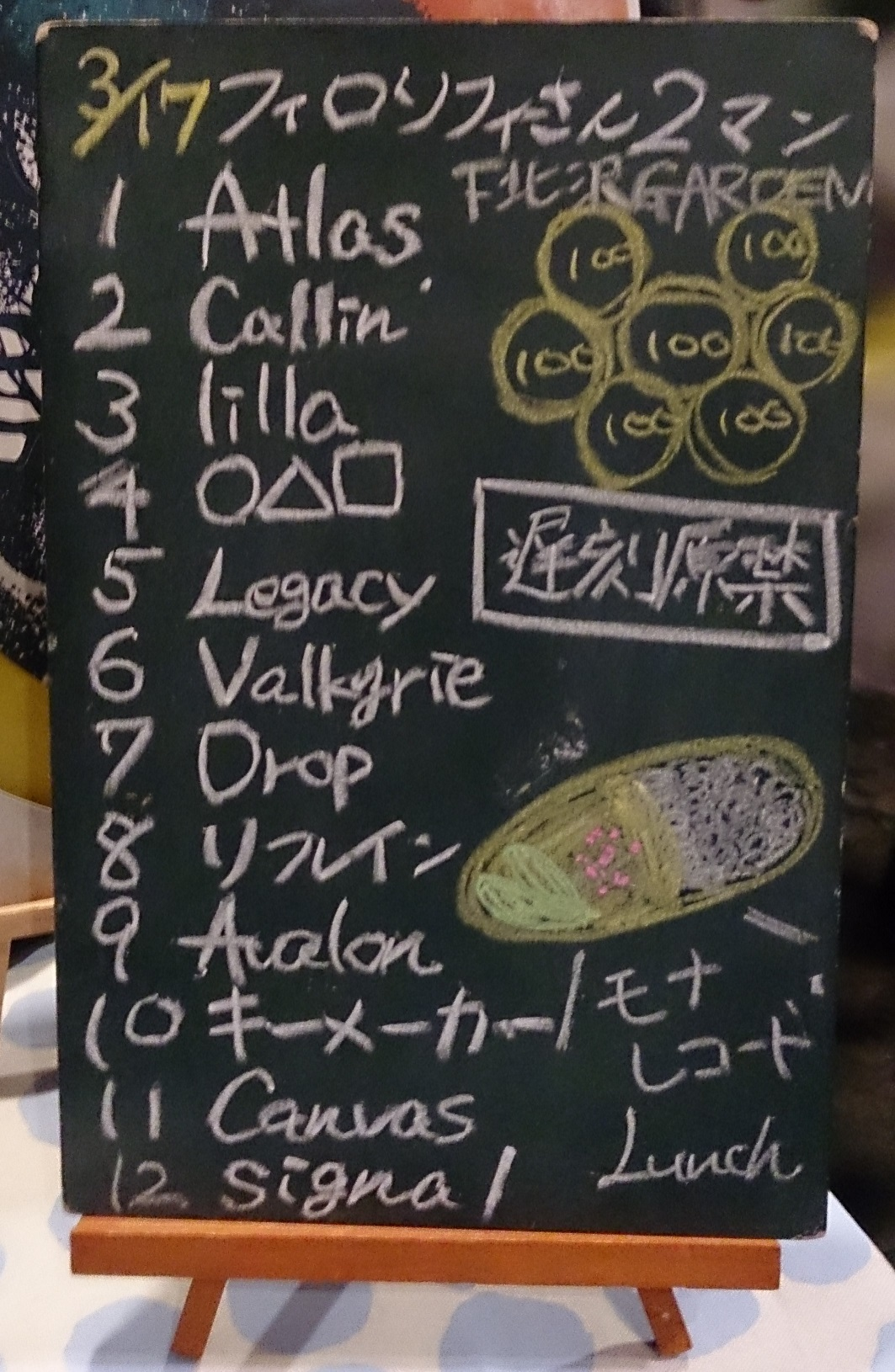 amiinAセトリボード(20180317(1))